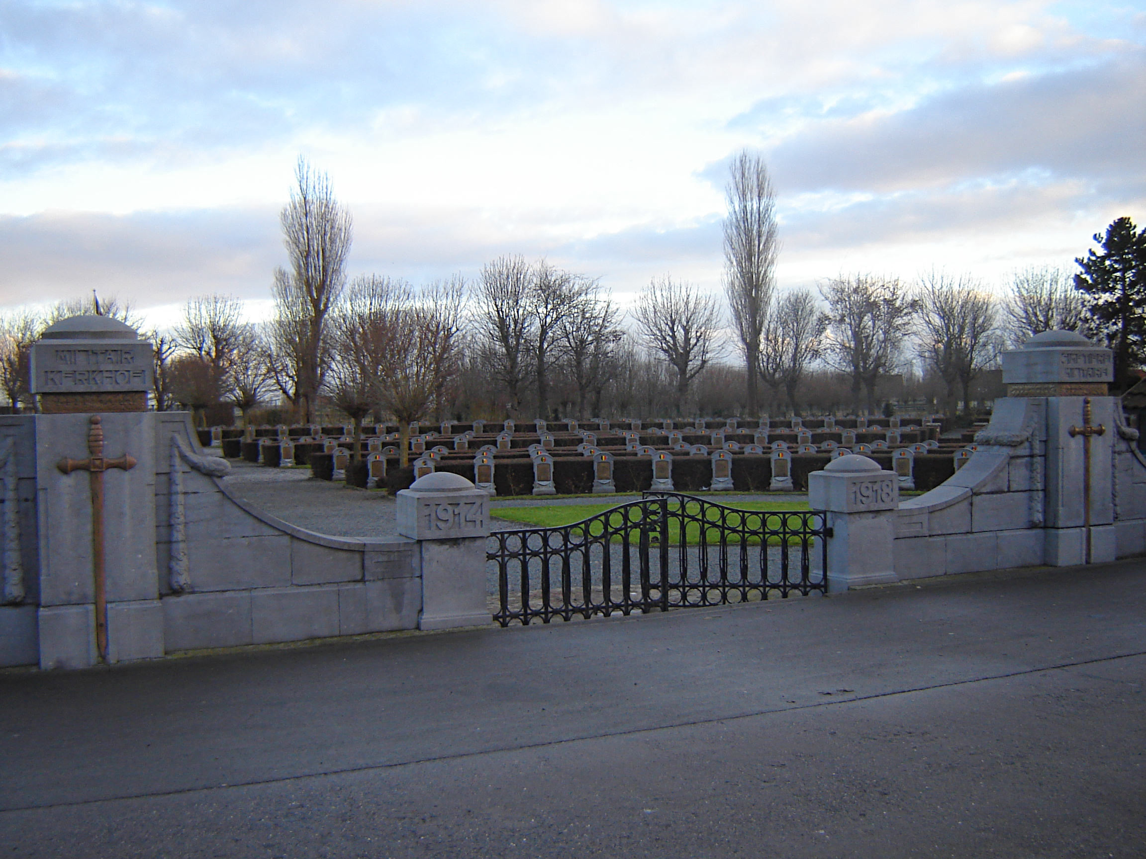 Belgische militaire begraafplaats in RamskapelleBelgian Military Cemetery in Ramskapelle. Ramskapelle, Nieuwpoort, West Flanders, Belgium